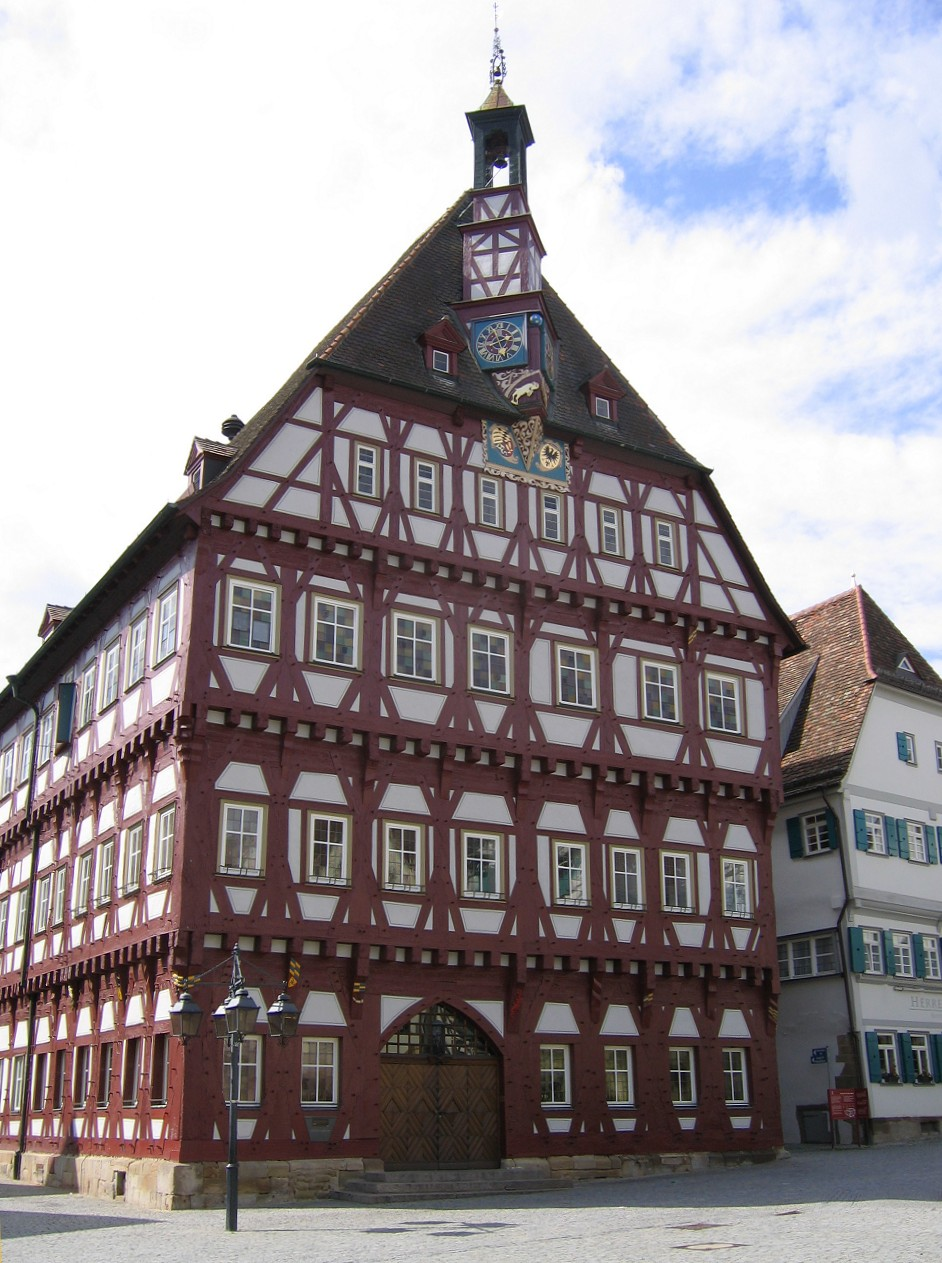 Markgröningen, Rathaus